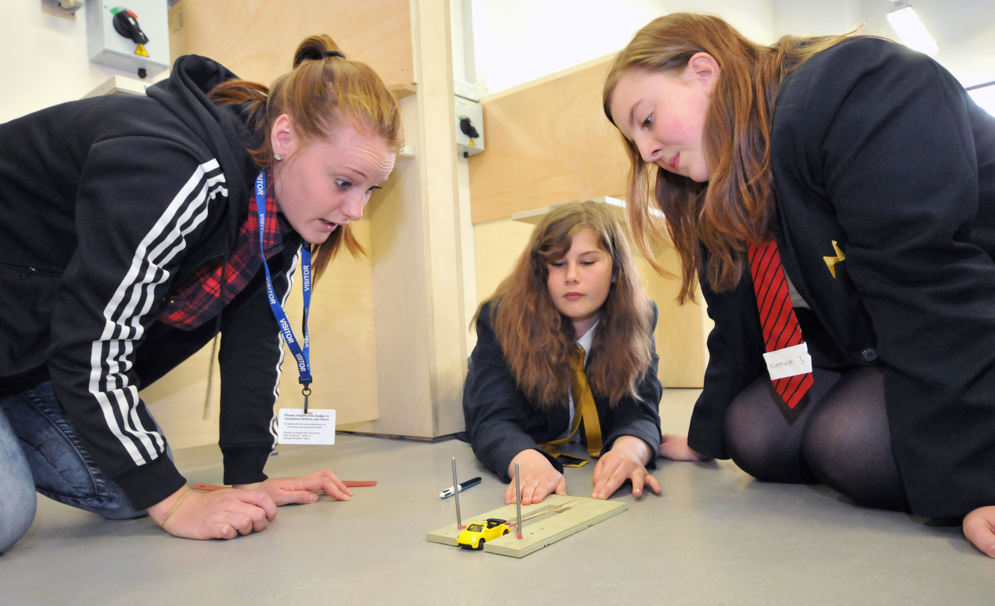 学校里的女工程师